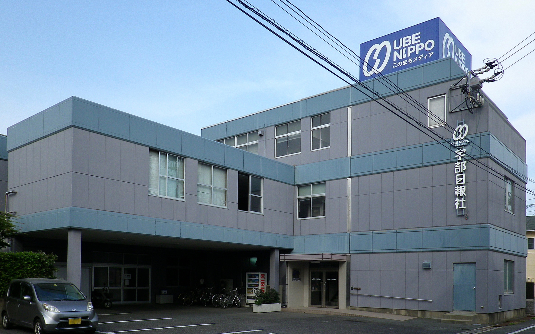 山口県宇部市。宇部日報本社。2011年5月8日撮影。